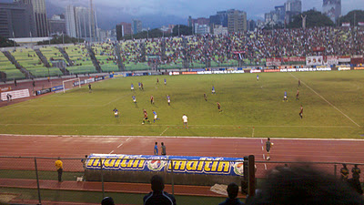 Clasico de la capital entre el Caracas Fc y el Deportivo Petare